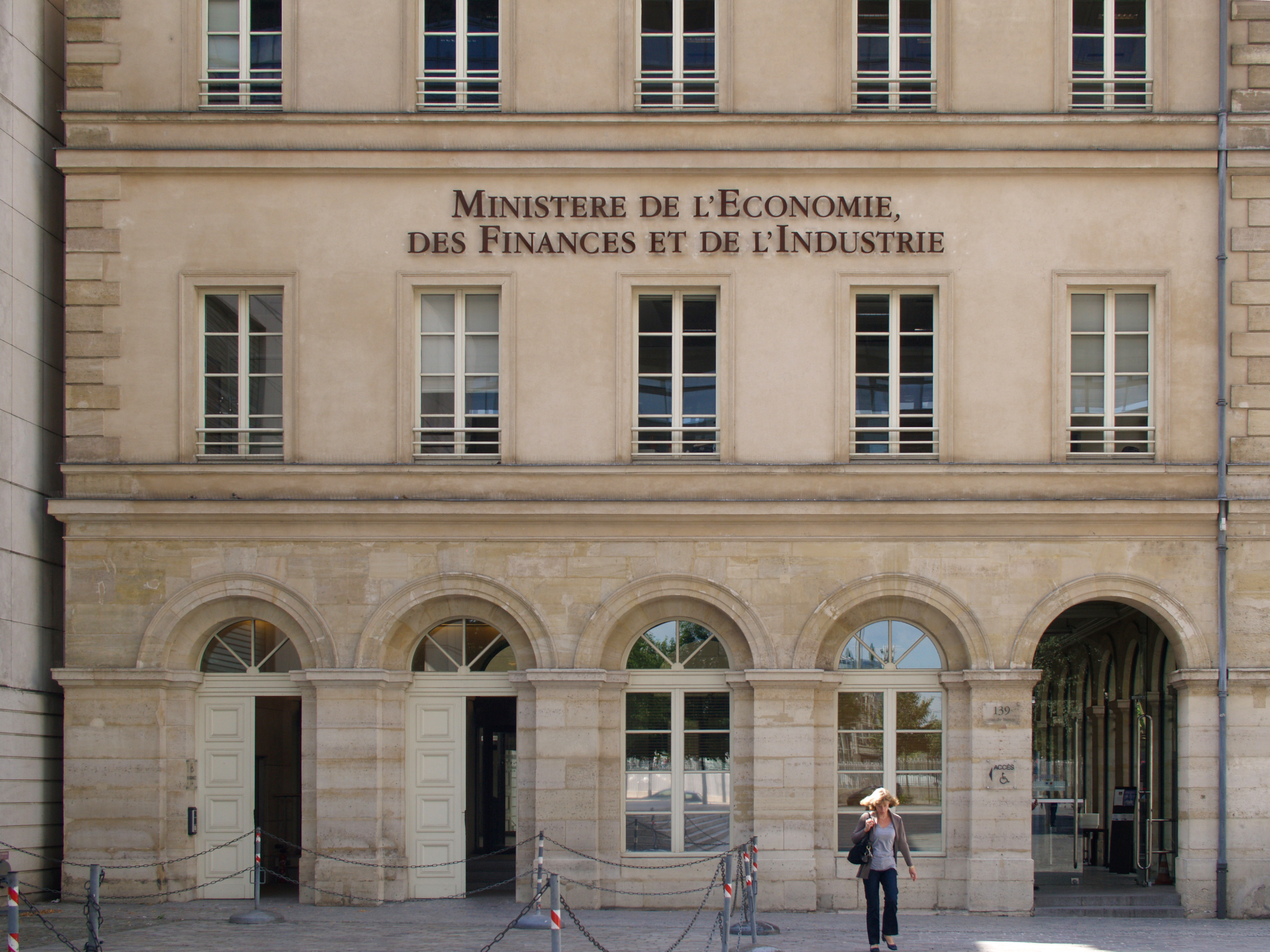 Le Ministère de l’Économie, des Finances et de l'Industrie à Paris (France)